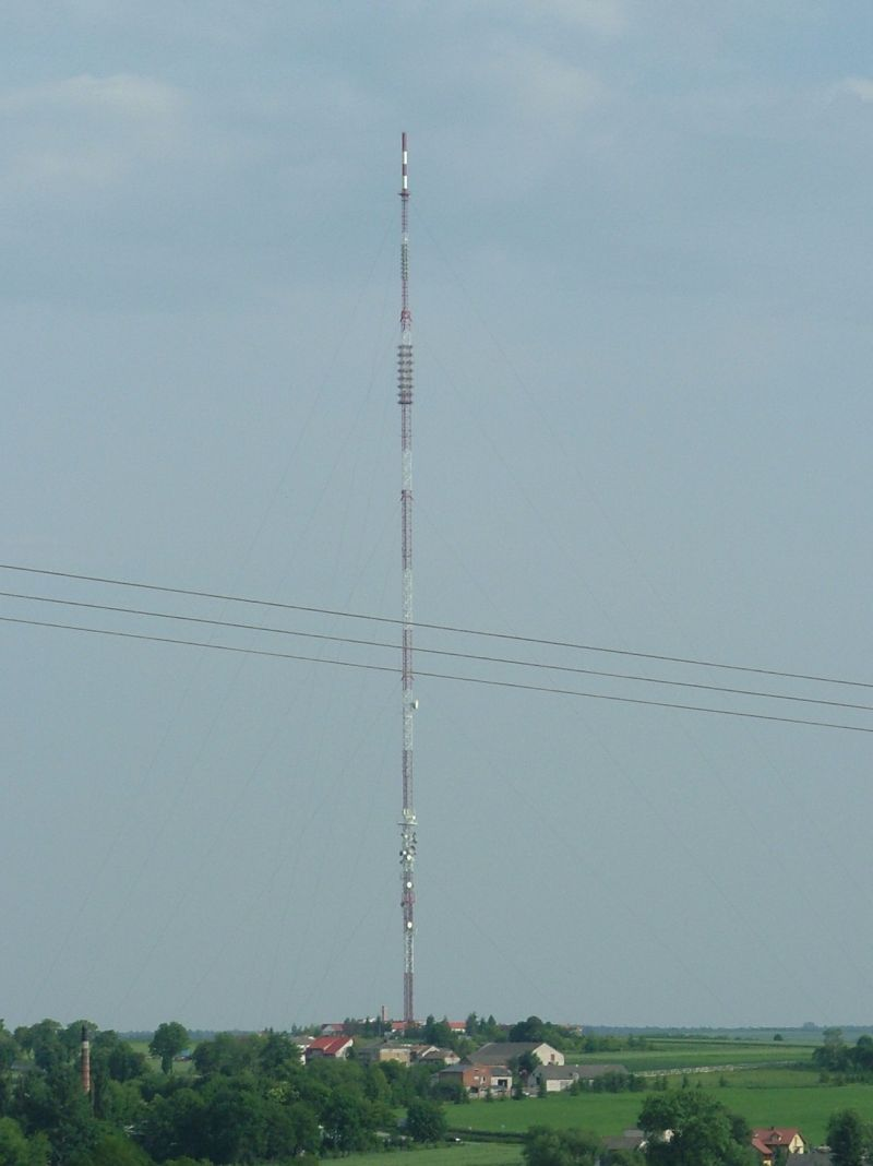 PL, Poland, województwo lubelskie, Maszt radiowy w Piaskach